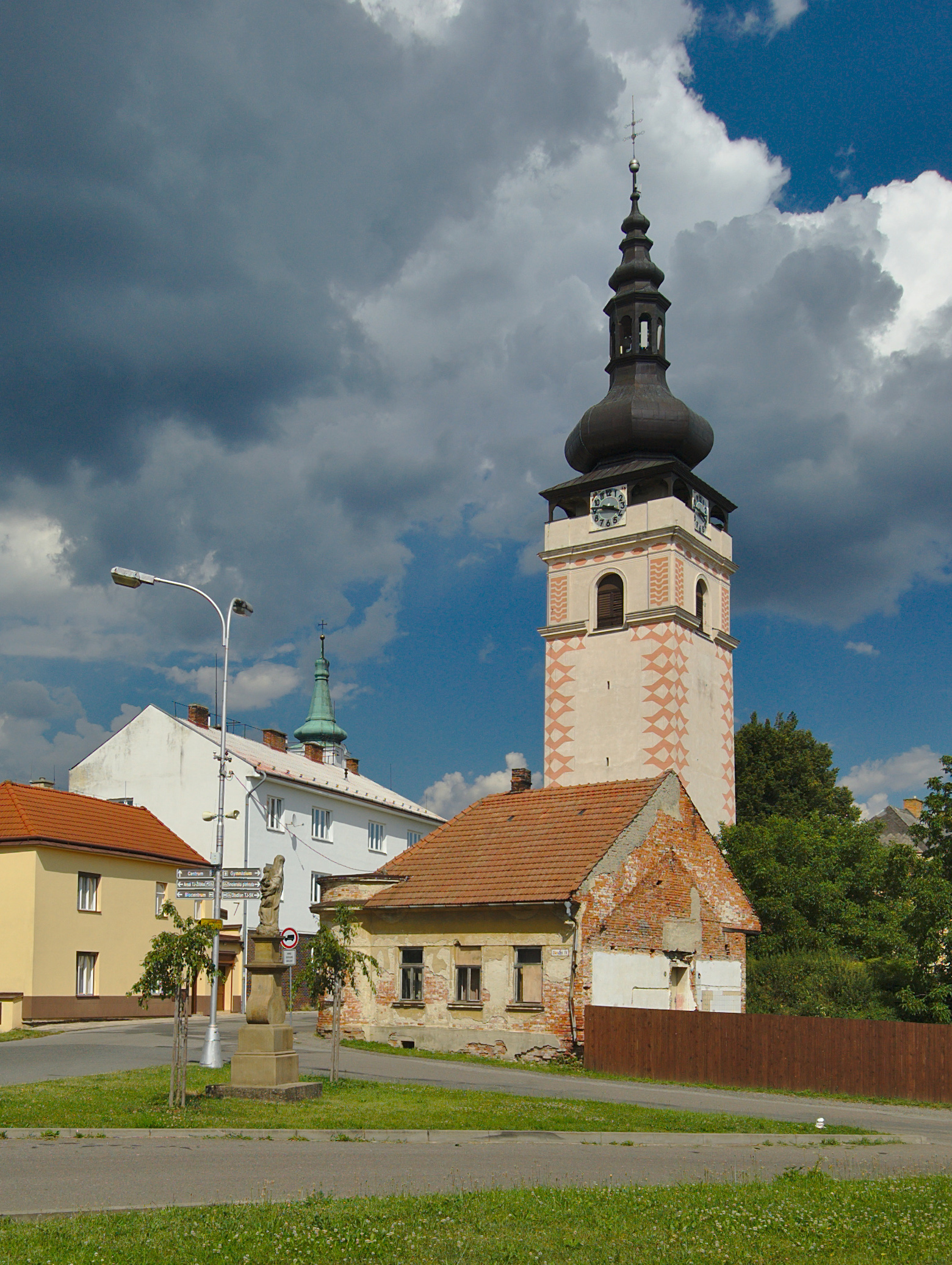 Věž, Jevíčko, okres Svitavy